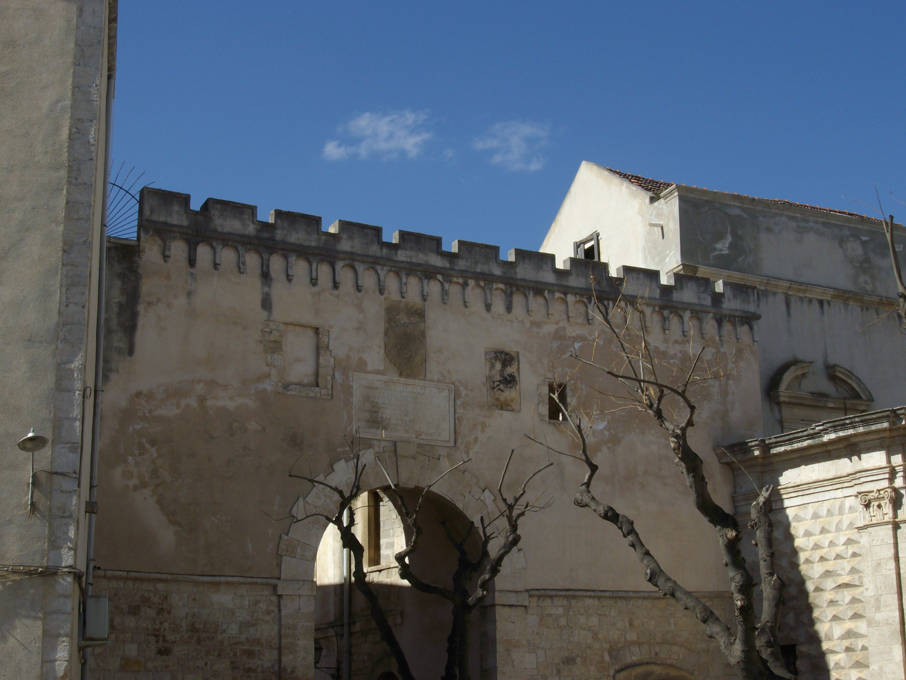 Ingresso del borgo antico di Bitetto